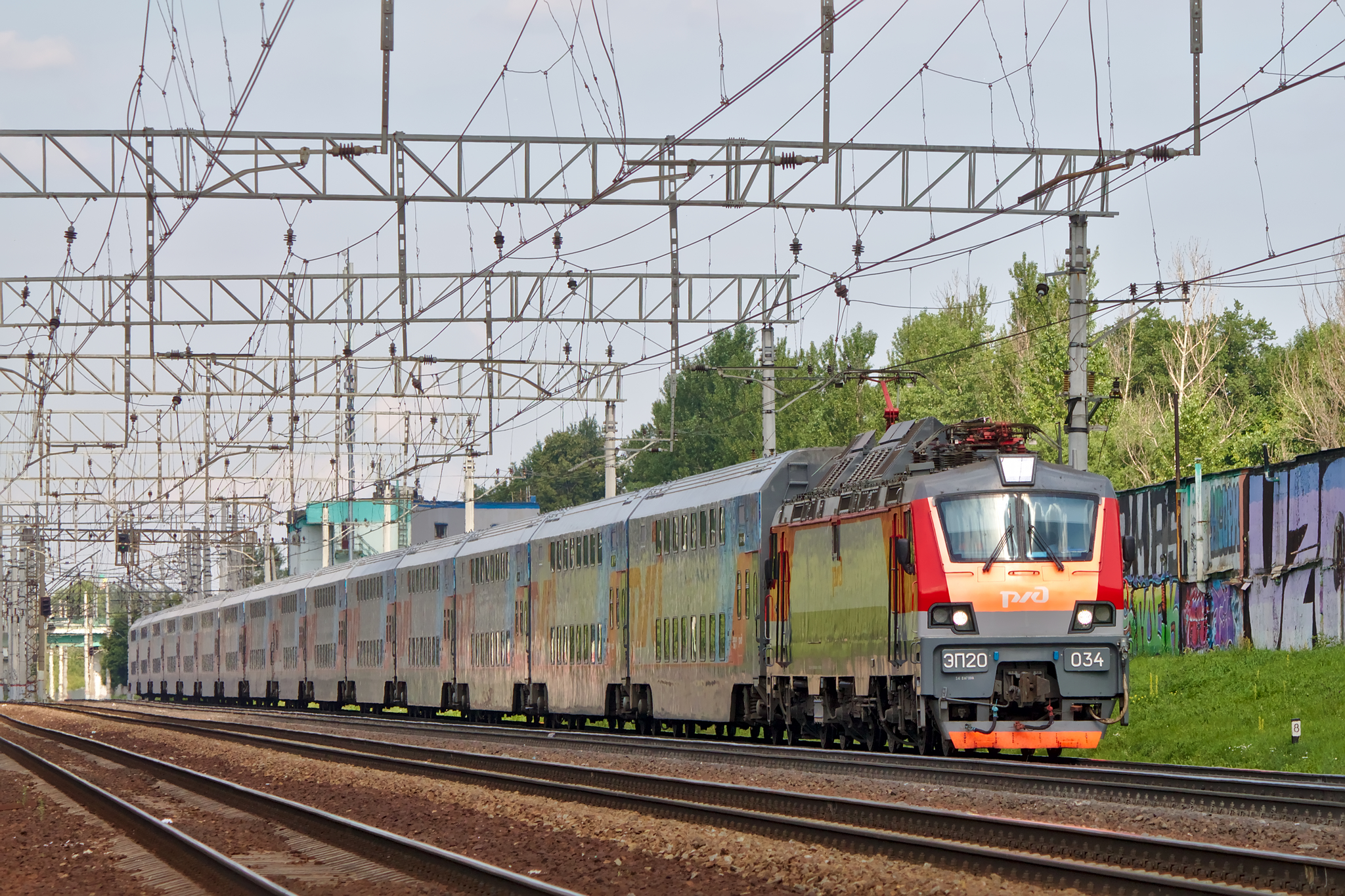 ЭП20-034, Перово - Люберцы-1 см. фото 607925 в альбоме автора